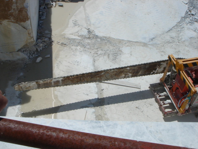 Schräme